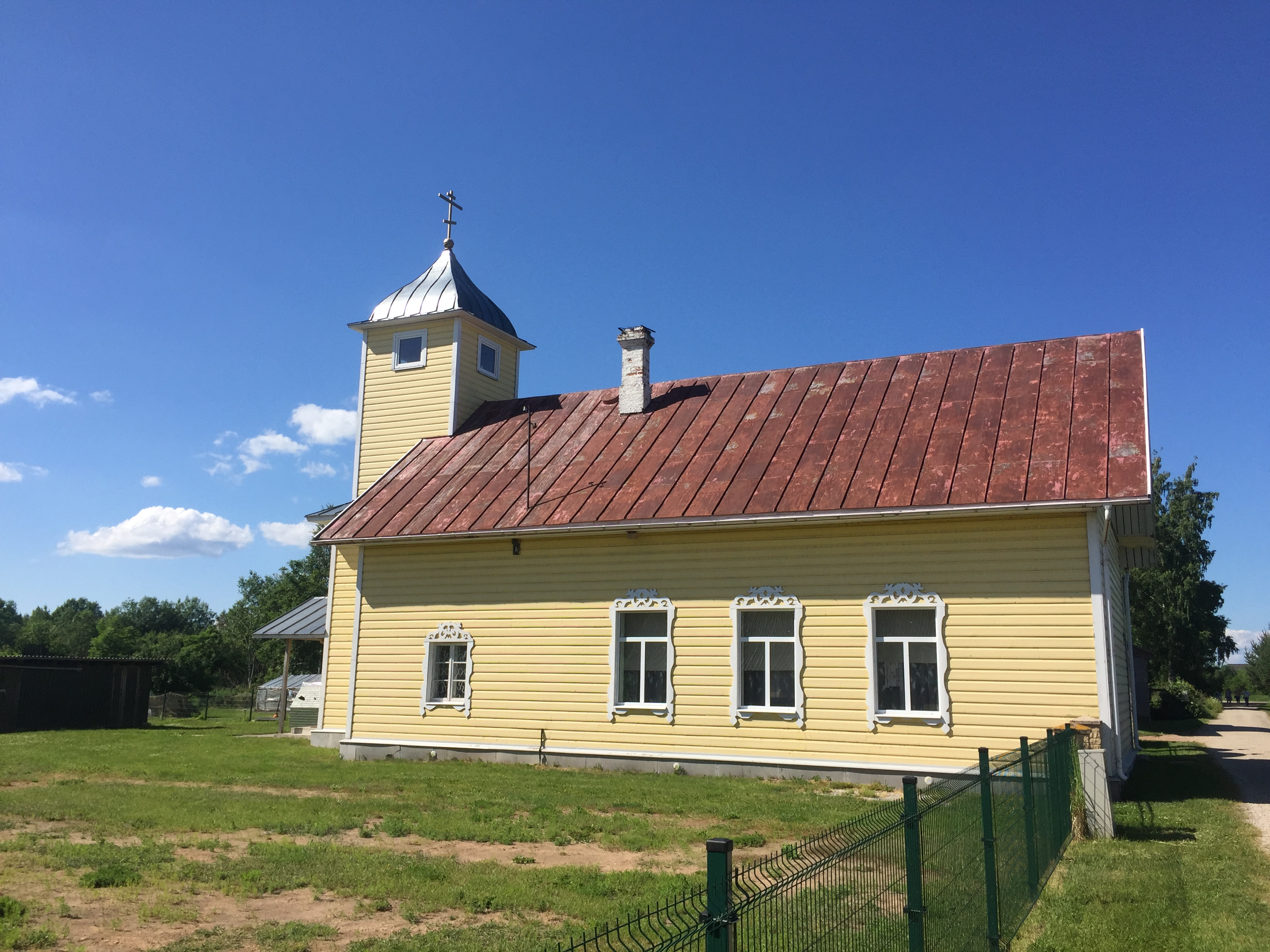 Raatvere maa-alune kalmistu